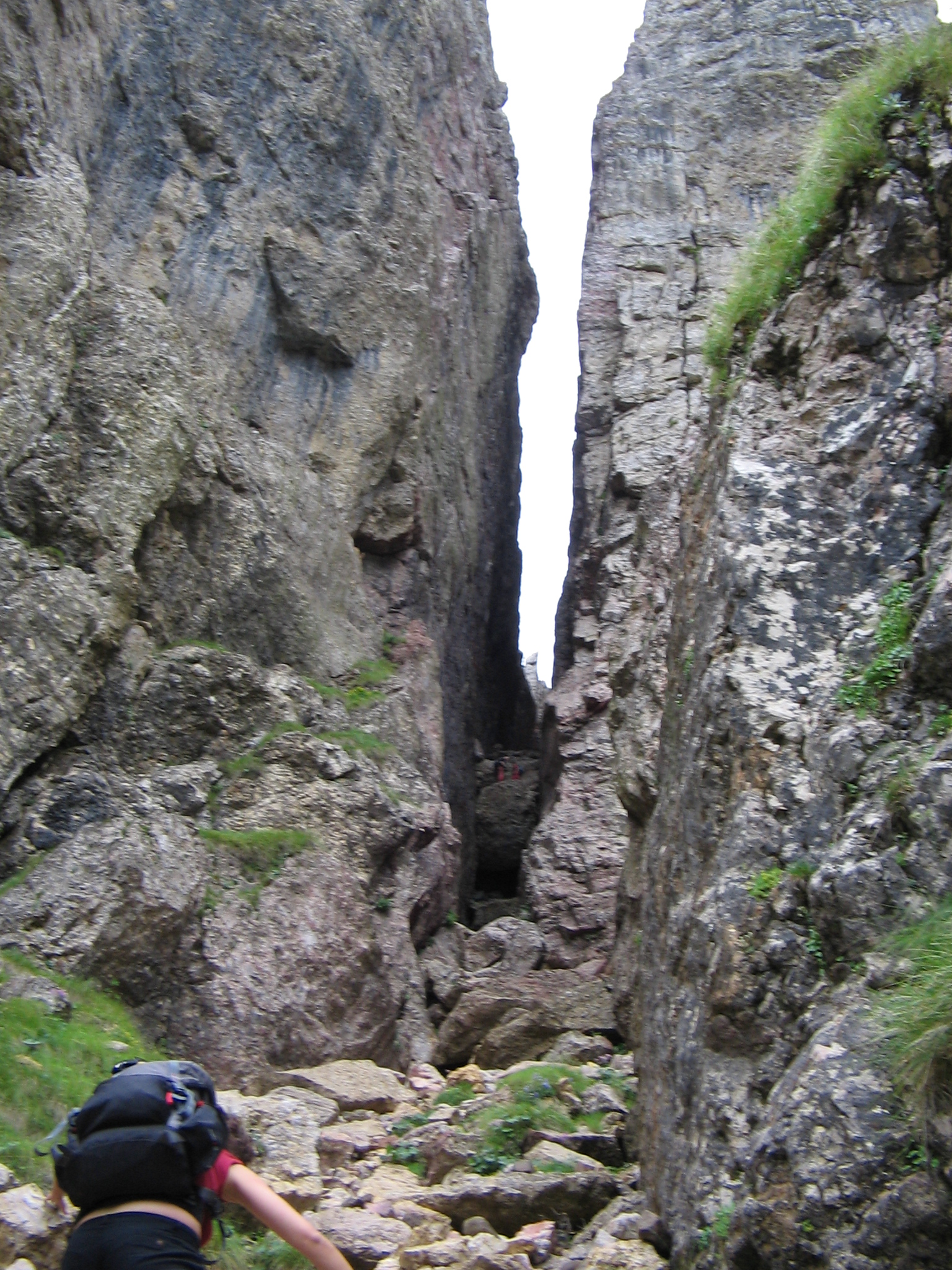 Vajo Stretto